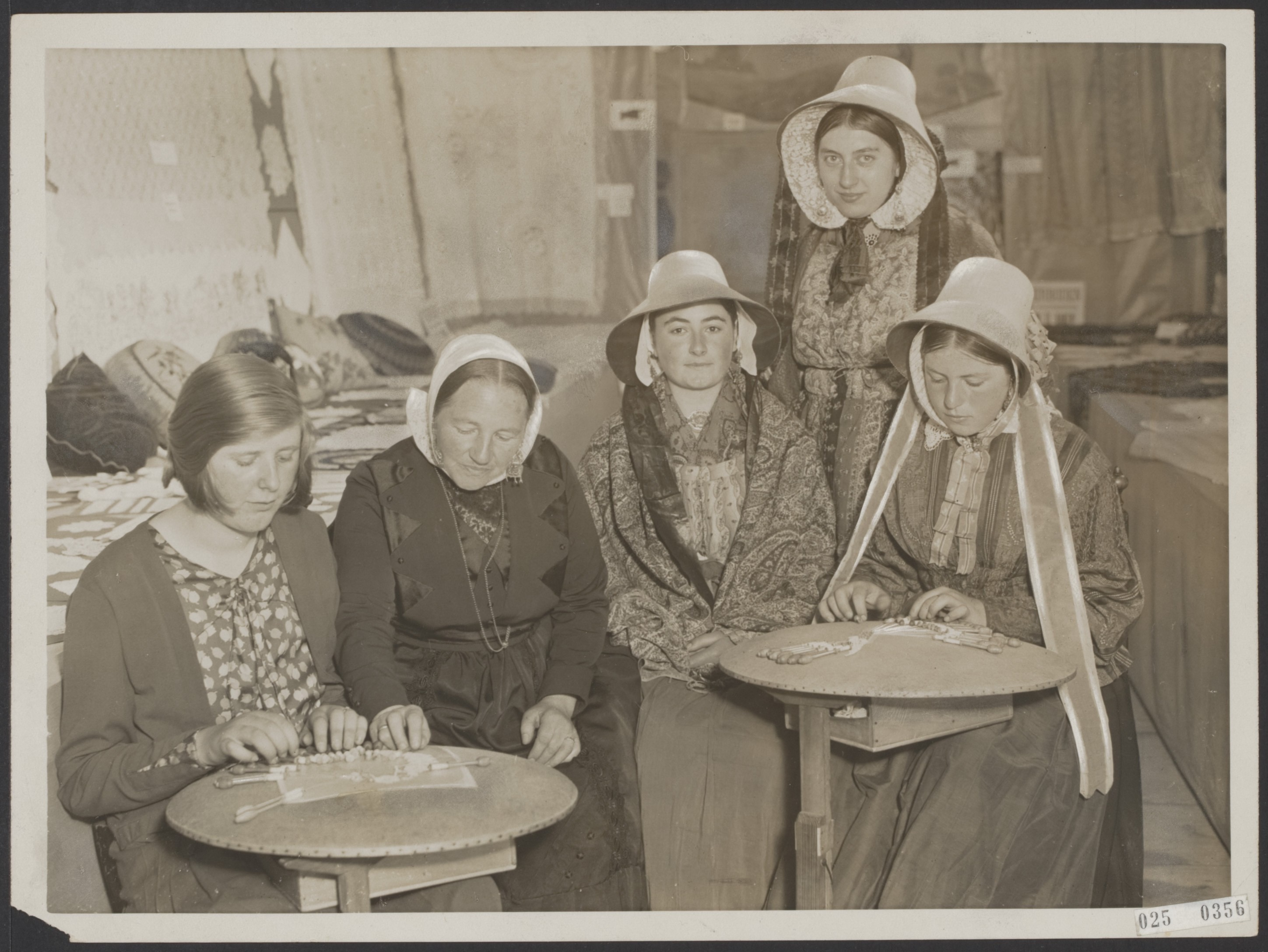 Huisvlijttentoonstelling te Oostburg (Zeeuws-Vlaanderen). Demonstratie van de kantwerkschool te Sluis in kantbewerken. Geheel links de moderne tijd, daarnaast 19e eeuw, daarnaast 1700, zittend 1850, staand 1830. Dit zijn enige klederdrachten uit het westelijk deel van Zeeuws-Vlaanderen